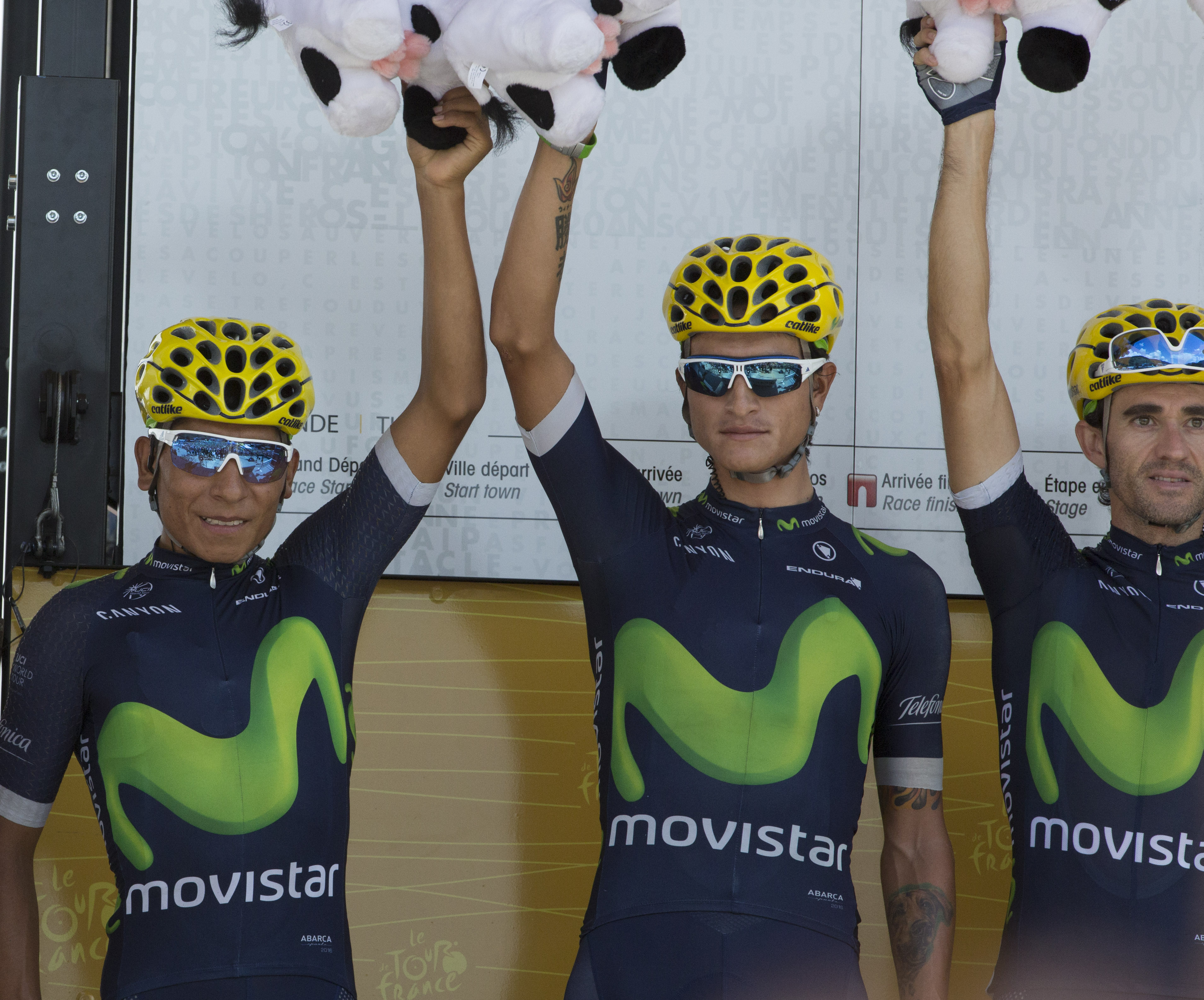 Movistar